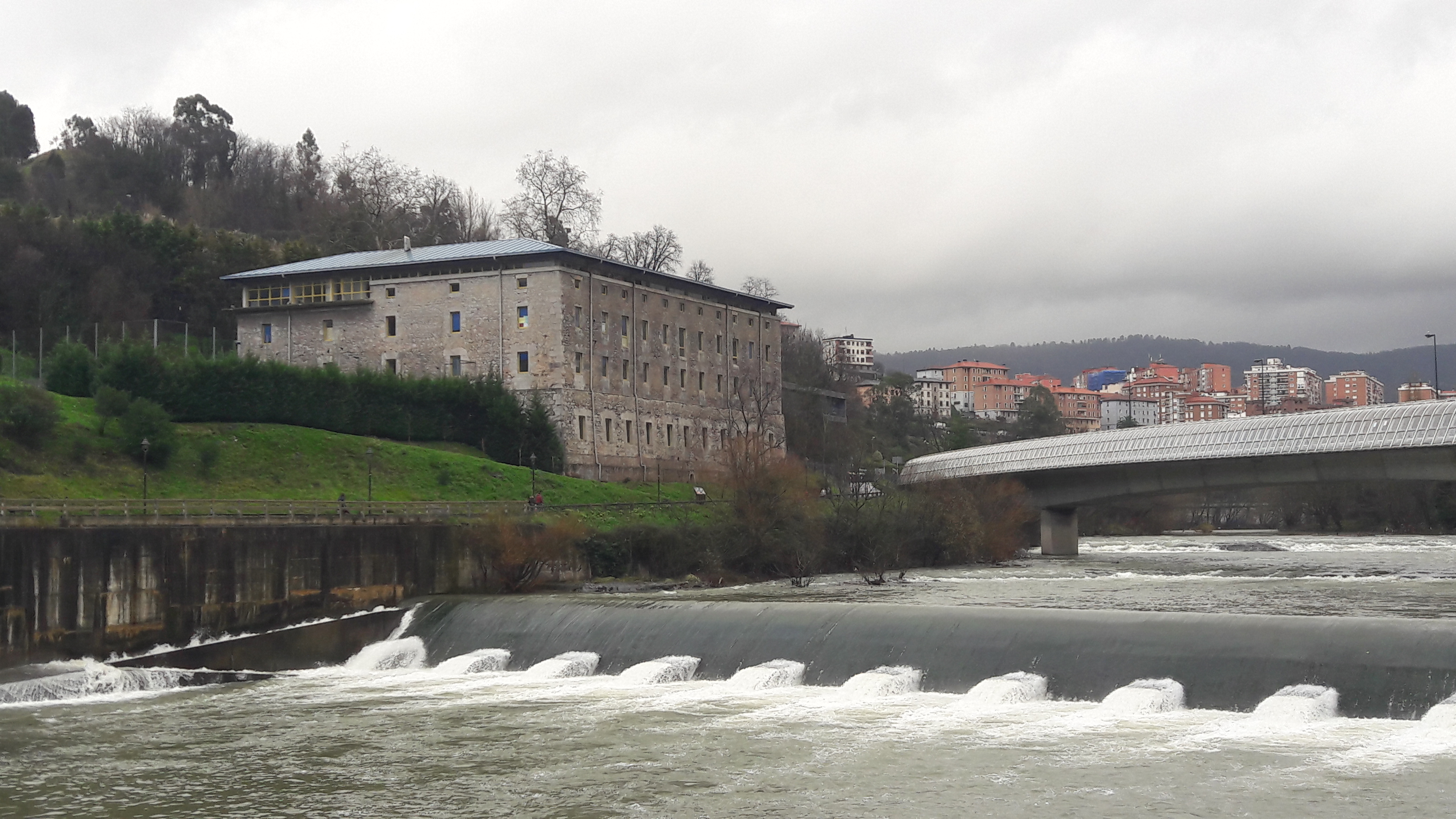 Abusu Ikastola. Eraikin historikoa